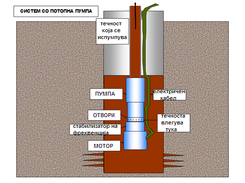 За потребите за статијата потопна пумпа